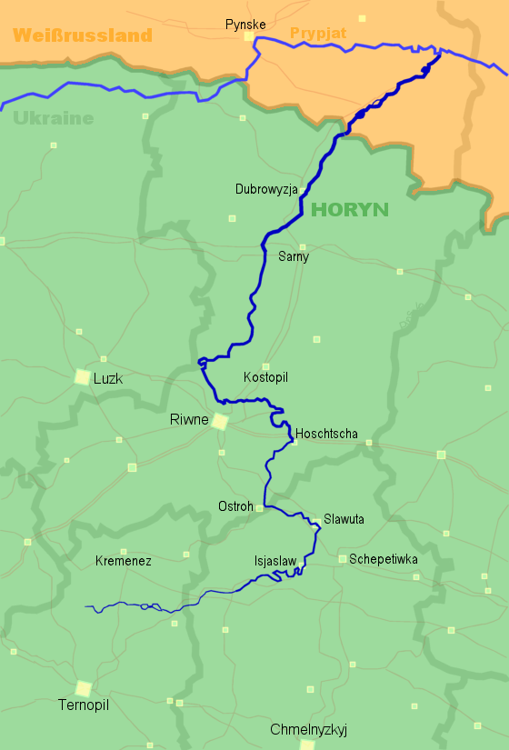 River in Ukraine and Belarus